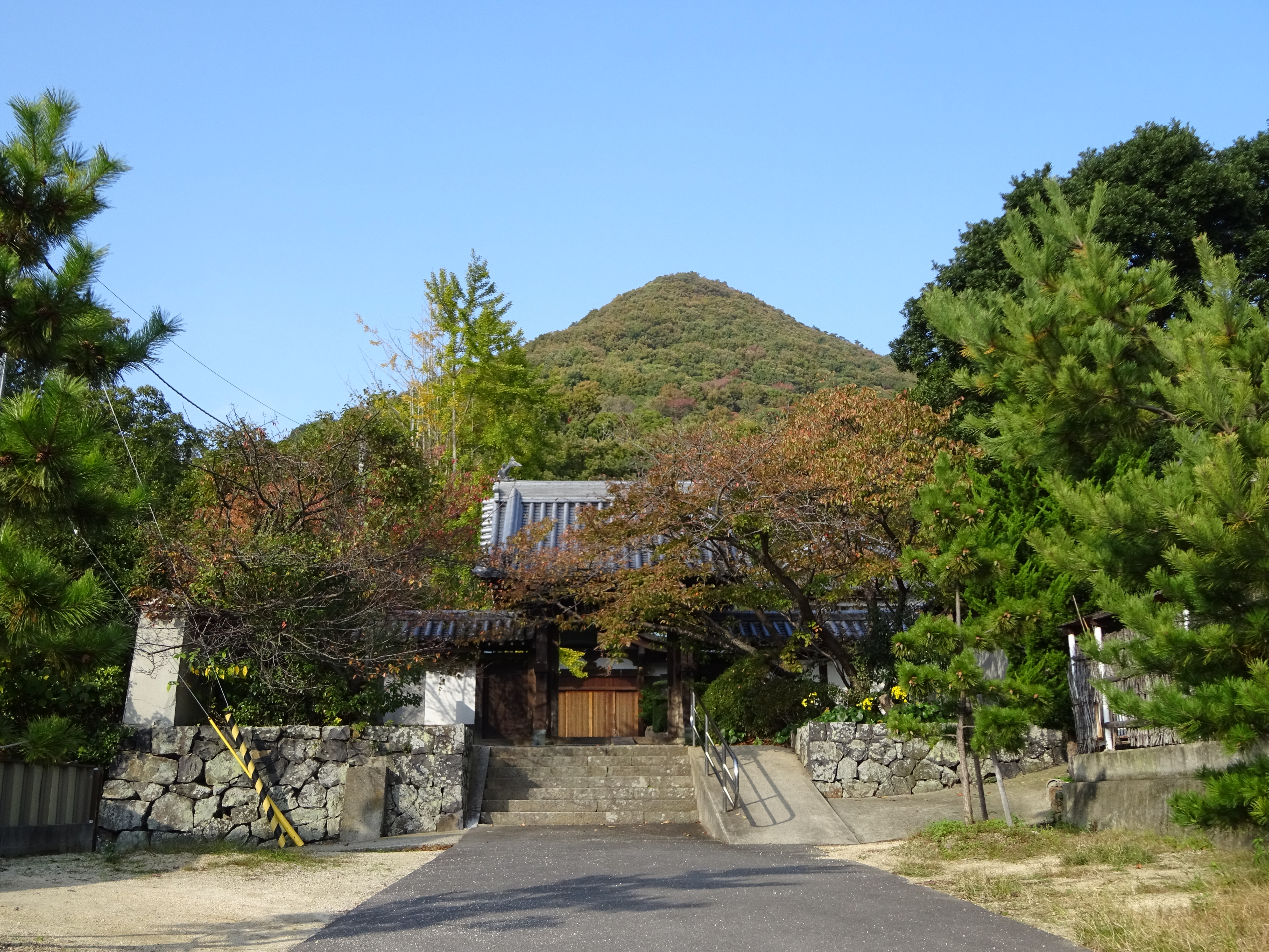 屋島の地蔵寺の山門前から西尾根（展望台）を望む